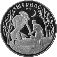 Монета Казахстана Шурале